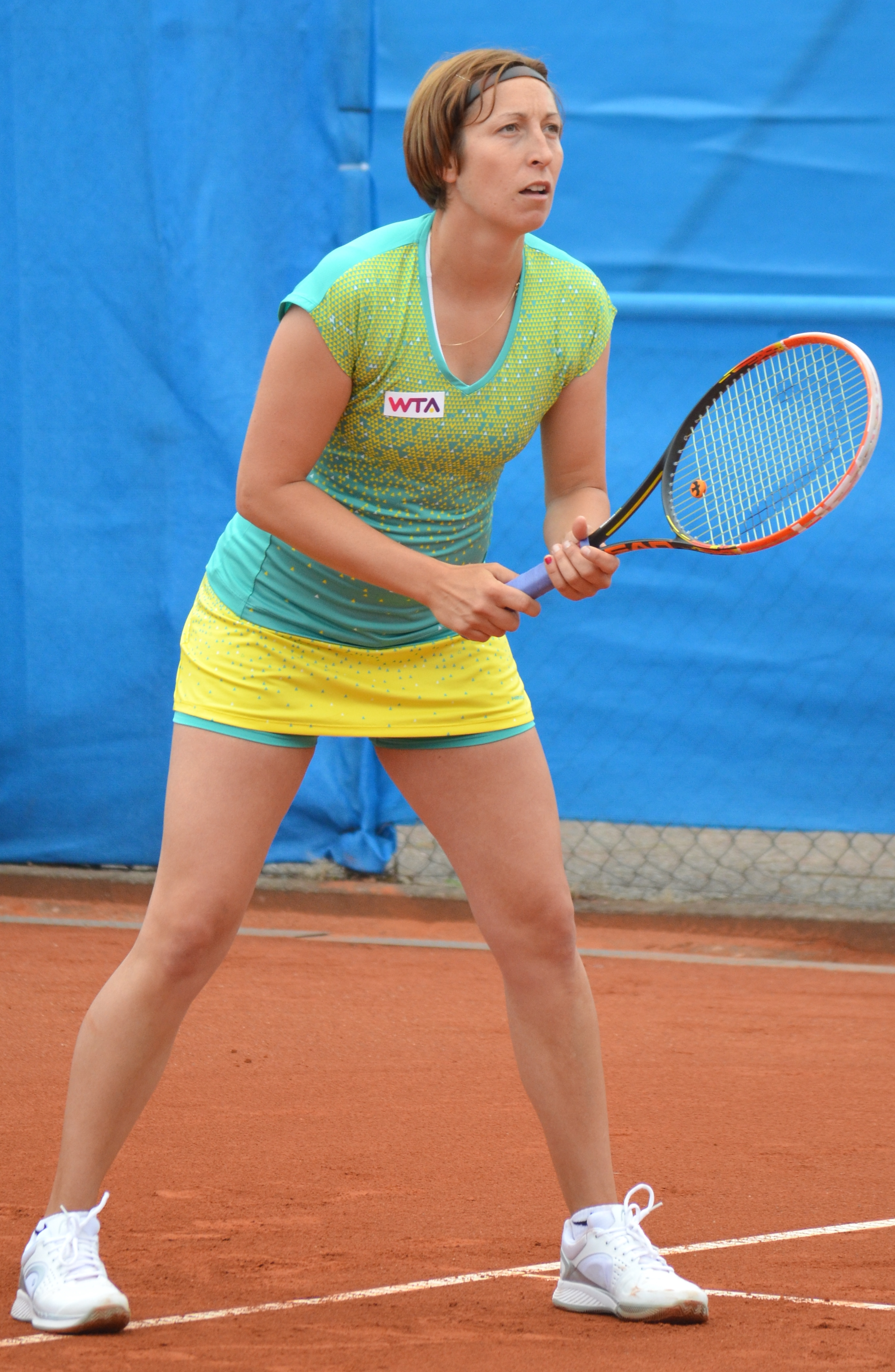 Yvonne Meusburger in der Erstrundenbegegnung der Doppelkonkurrenz gegen Michaella Krajicek und Karolina Pliskova beim Nürnberger Versicherungscup 2014